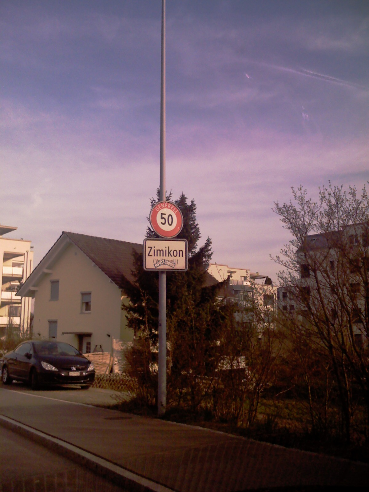 Eniro al la vilaĝo de Zimikon, komunumo Volketswil, Kantono Zuriko, Svislando